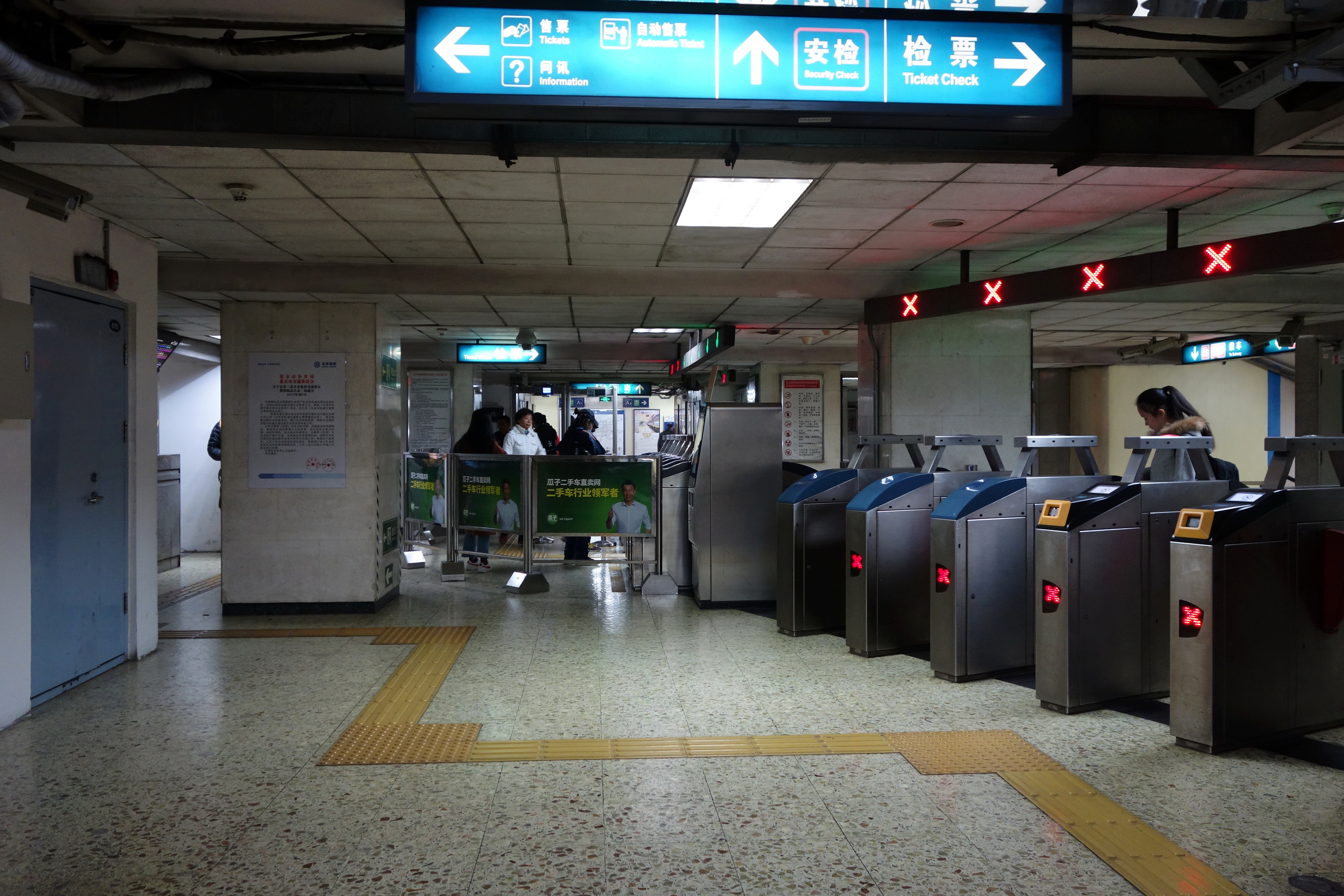 北京地铁1号线玉泉路站站厅